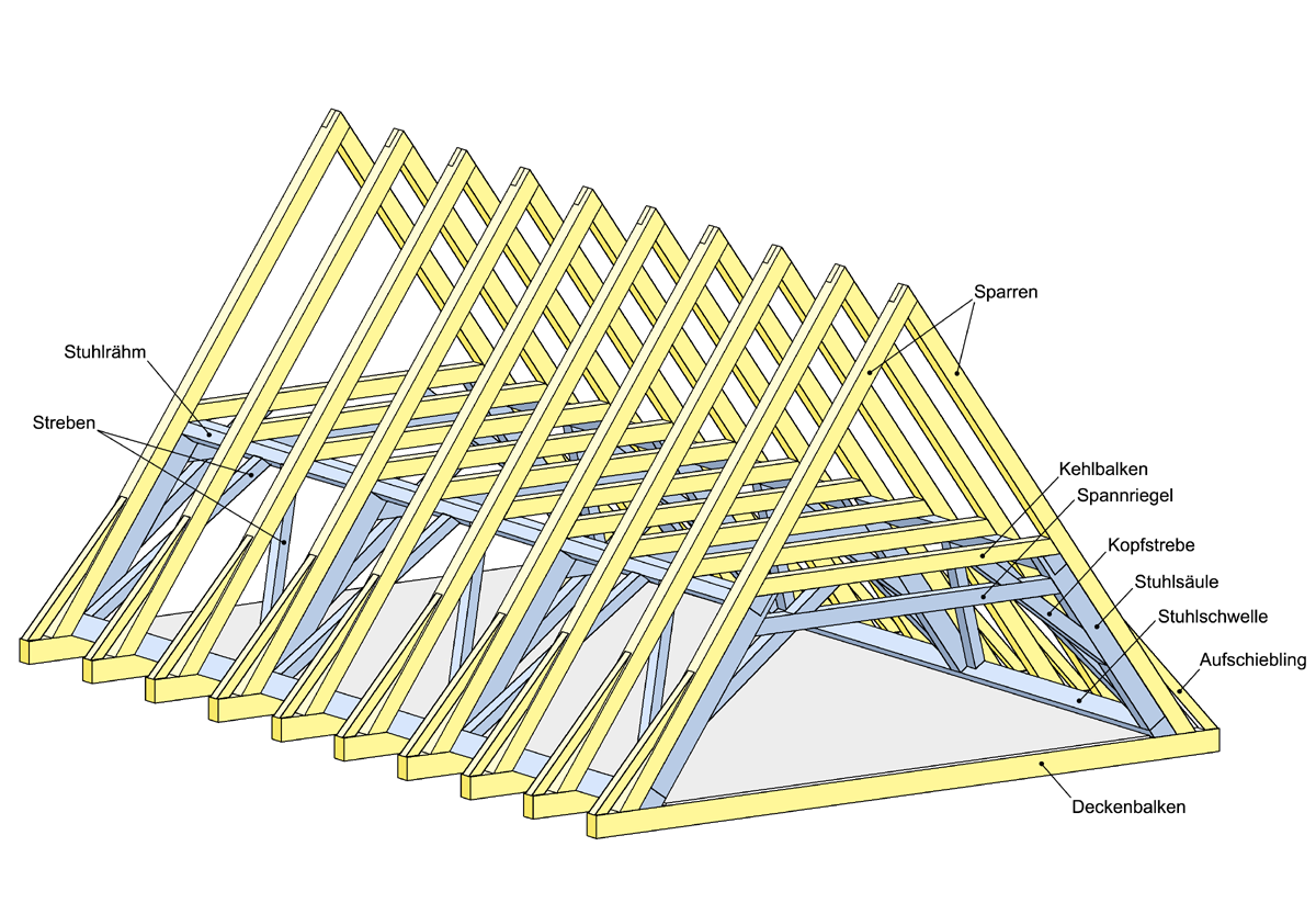 Dachkonstruktion eines traditionellen Kehlbalkendaches mit liegendem Stuhl.